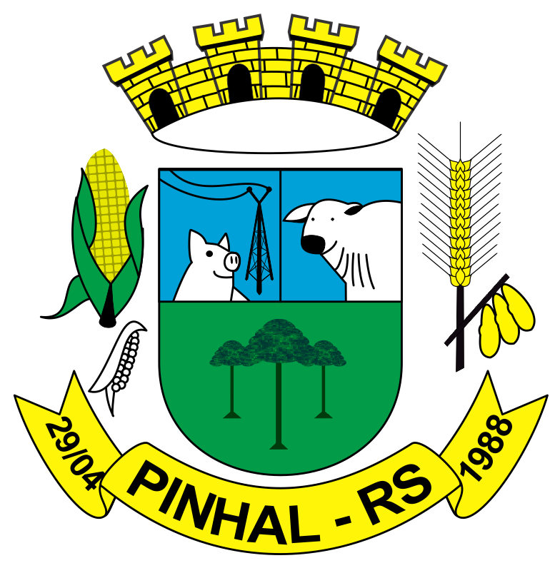 Brasão de Armas do município de Pinhal, Rio Grande do Sul, Brasil.